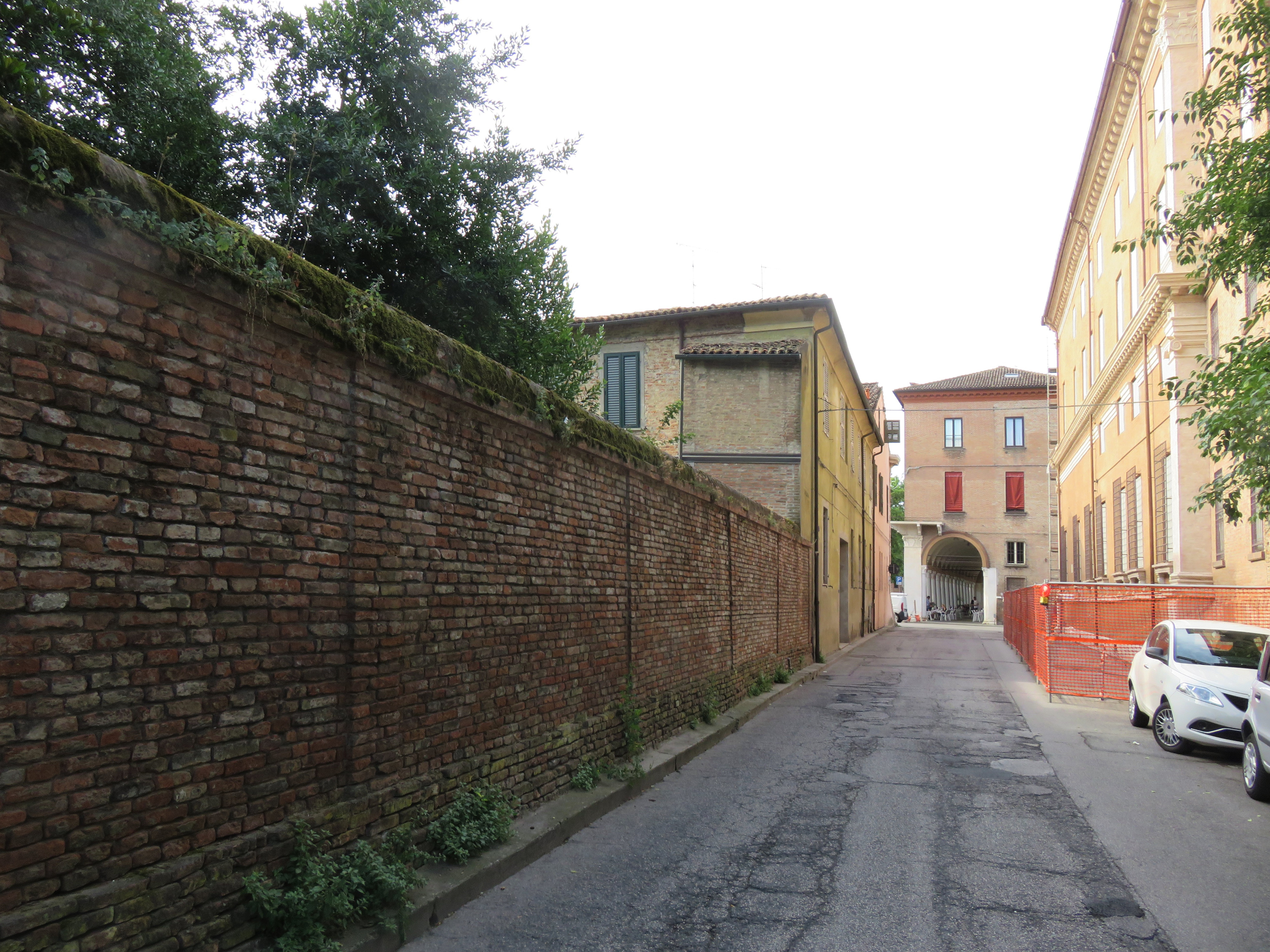 Via Borso, vista su corso Porta Mare.